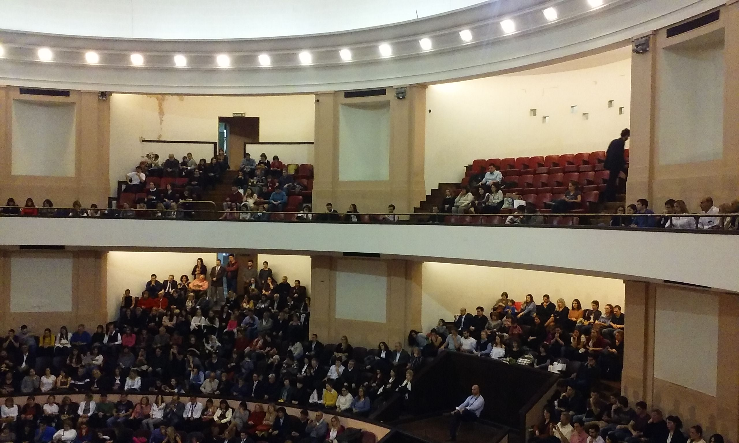 Palcos del aula magna de la Facultad de Medicina de la Universidad de Buenos Aires en junio de 2017, durante una ceremonia de graduación de estudiantes.